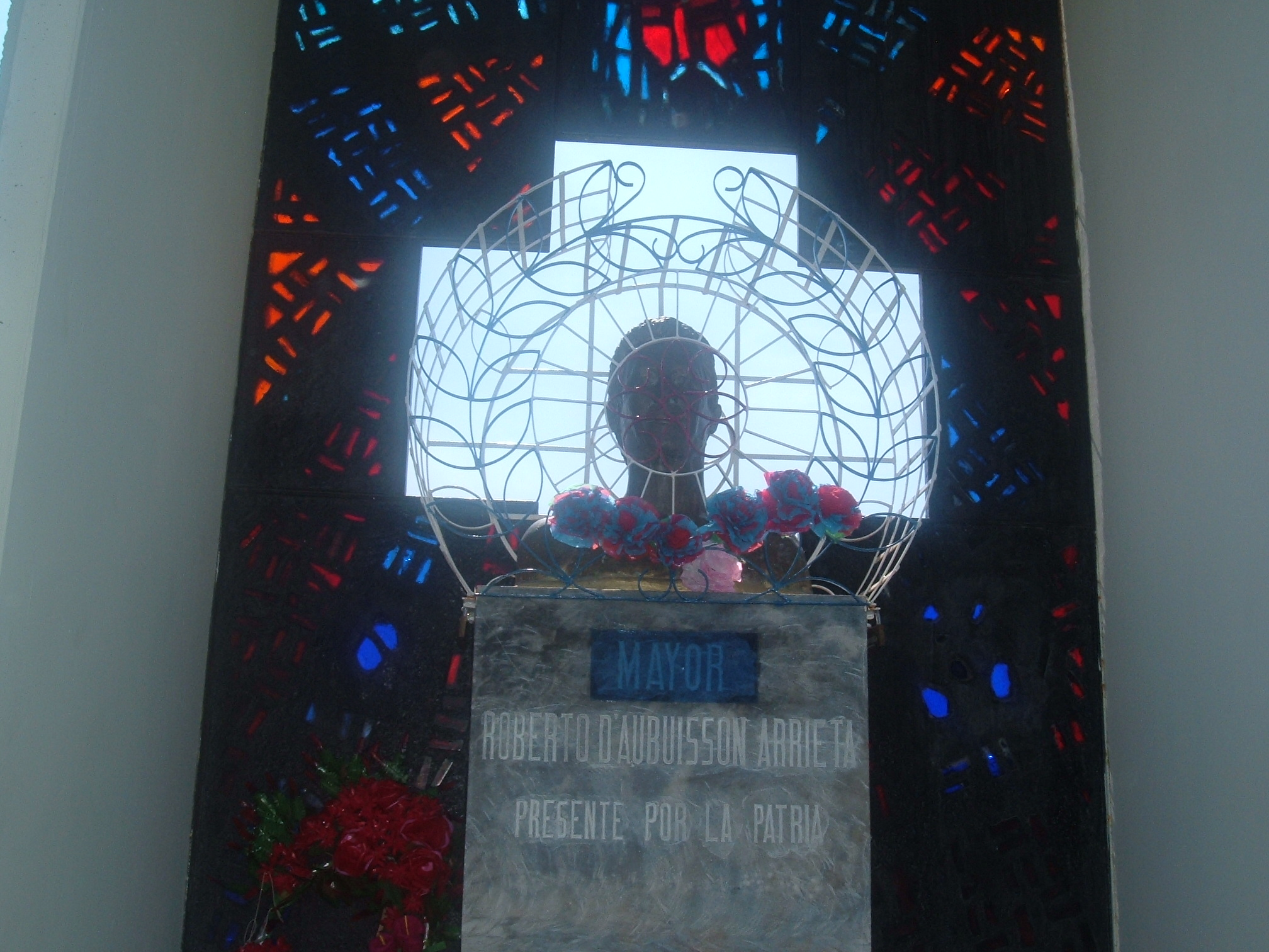 Roberto d'Aubuisson's tomb in cementerio de los Ilustres in San Salvador, El Salvador. Salvadorean politician of the XX century.